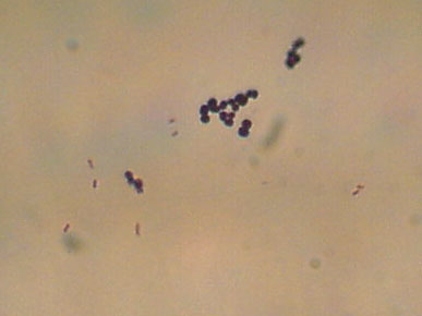 Gramfärbung Escherichia coli (Gramnegativ) und Micrococcus luteus (Grampositiv)